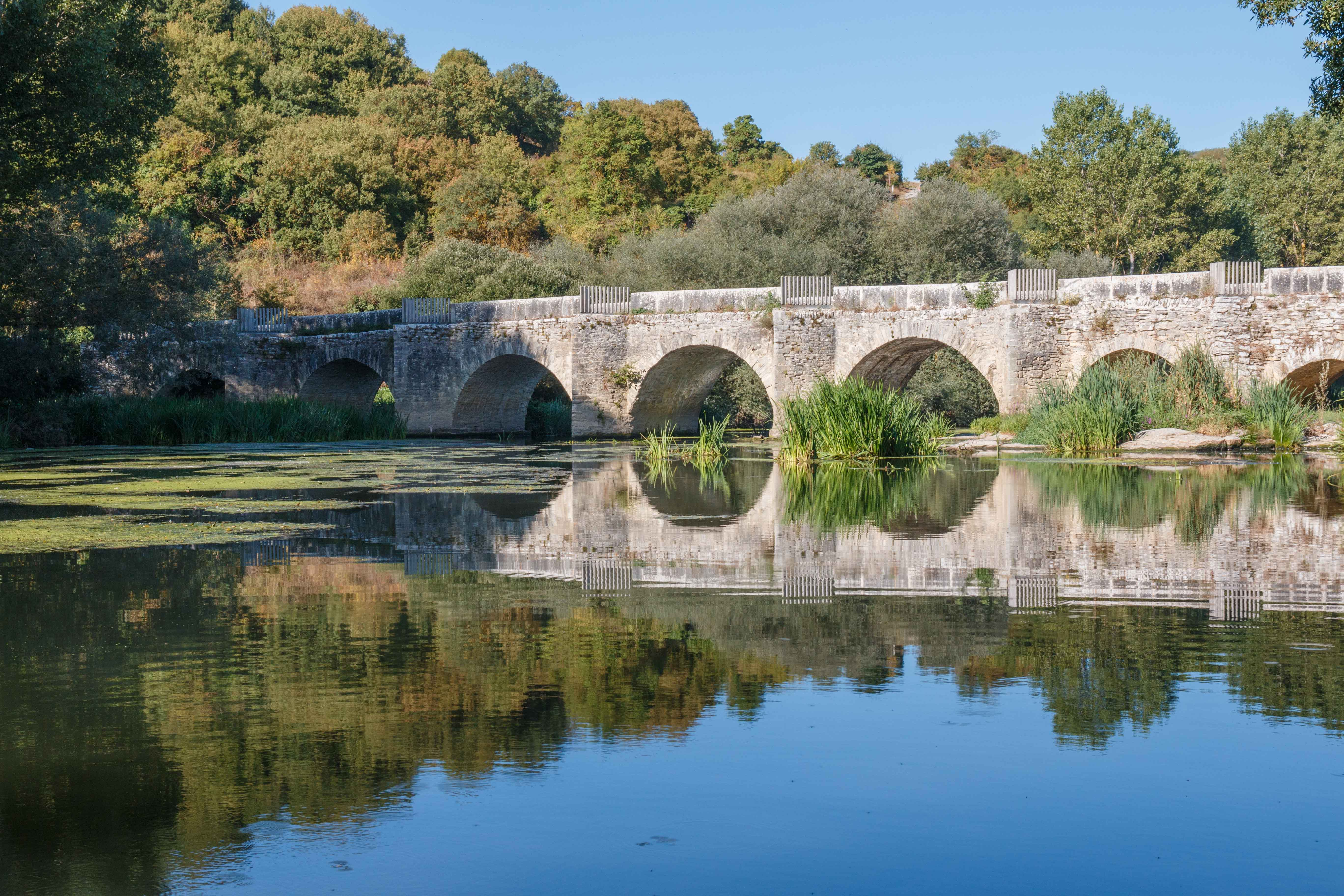 Iruña-Trespondeko Zubia/Puente de Iruña-Trespuentes